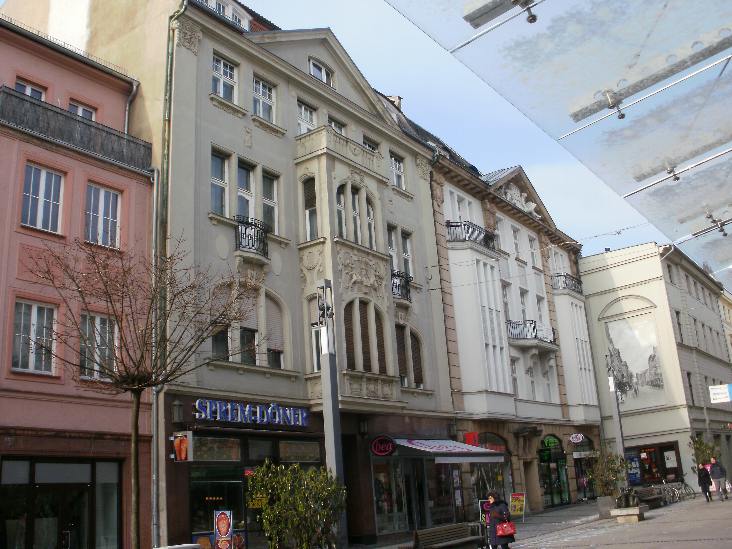 Wohn- und Geschäftshäuser Spremberger Straße 40-43, Cottbus